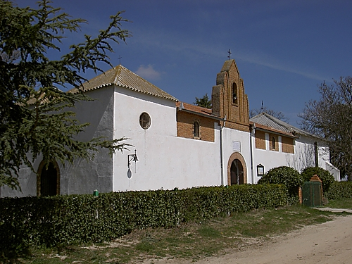 Vista de la fachada